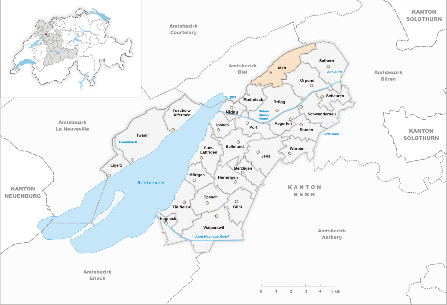 Municipality Mett